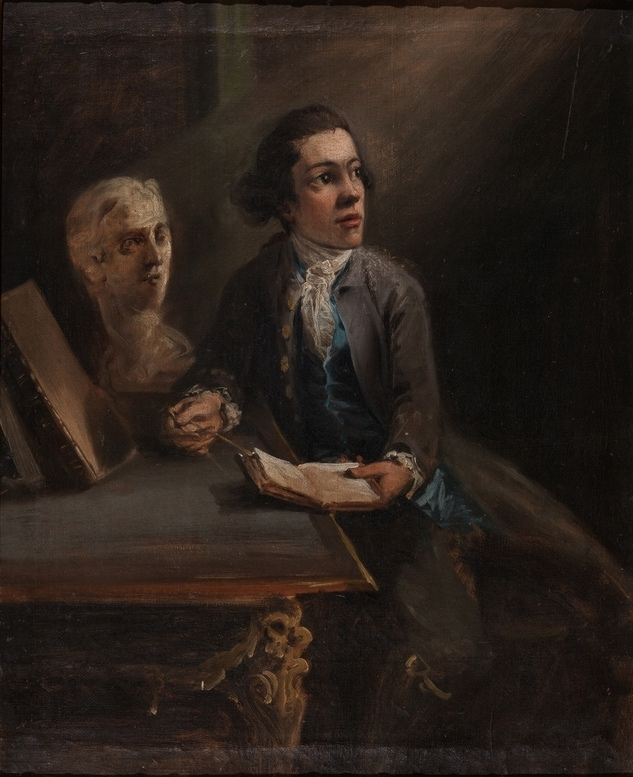 Porträtt av Georg Haupt utfört ca 1775 av Elias Martin. Tillhör nordiska museet med följande beskrivning. Haupt, Georg. Knäst. olja på duk. Ram förg. 1770-80-talet. Elias Martin. Georg Haupt f 1741, d. 1784, hofchatullmakare och ebenist. Mörkt hår, bruna ögon, grå rock och byxor, blå väst, spetshalsduk och manschetter, bok och passare." Identifikationsnummer: NM.0098978